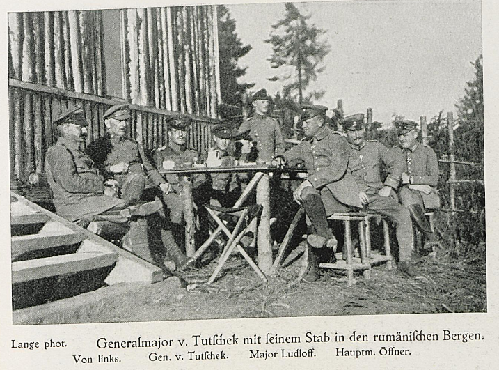 Generalmajor Ludwig Ritter von Tutscheck mit seinem Stab in den rumänischen Bergen Von links: v. Tutschek, Ludloff, Öffner